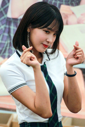 170910 프리스틴 팬싸인회